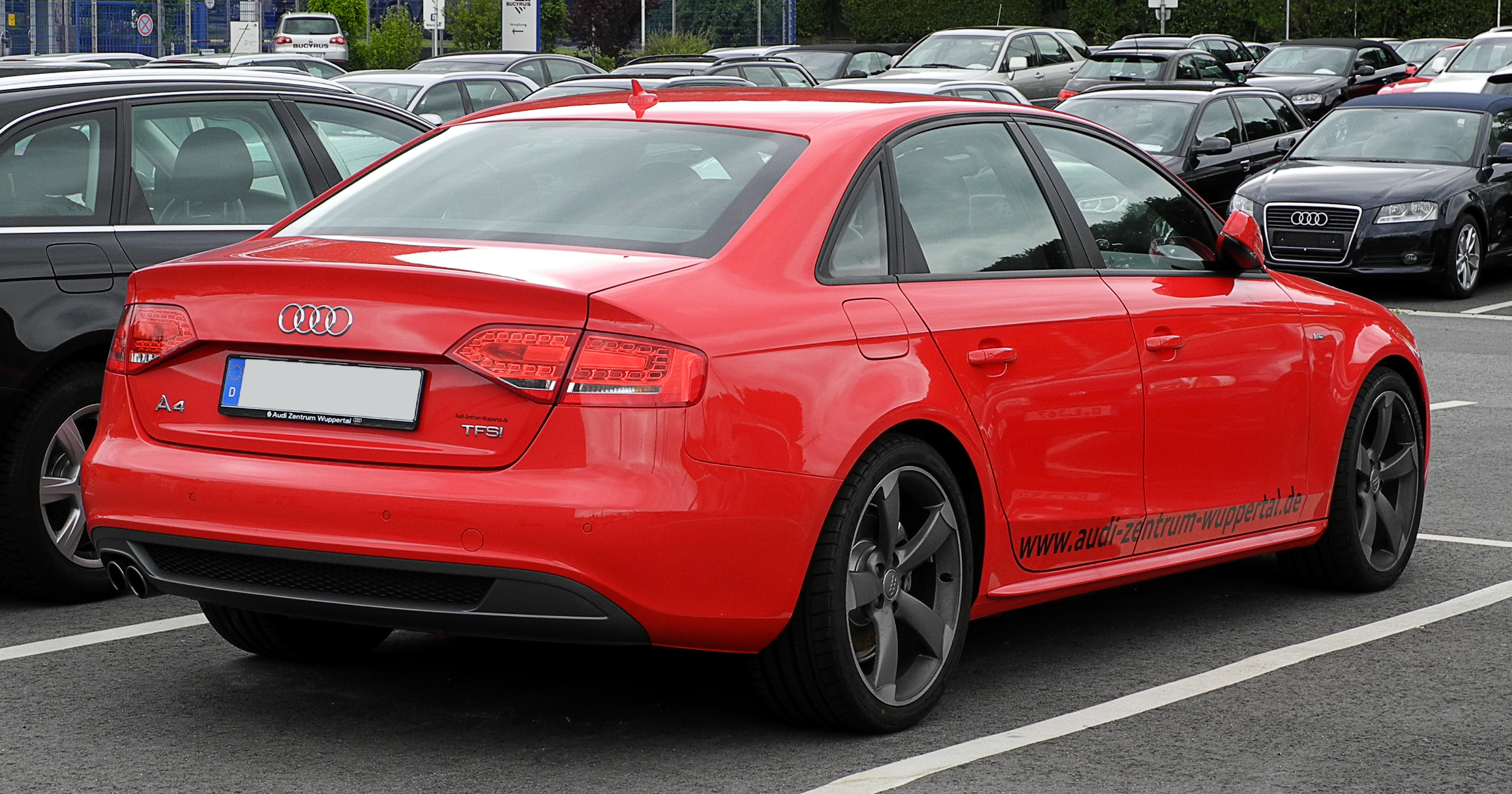 Audi A4 TFSI S-line (B8)